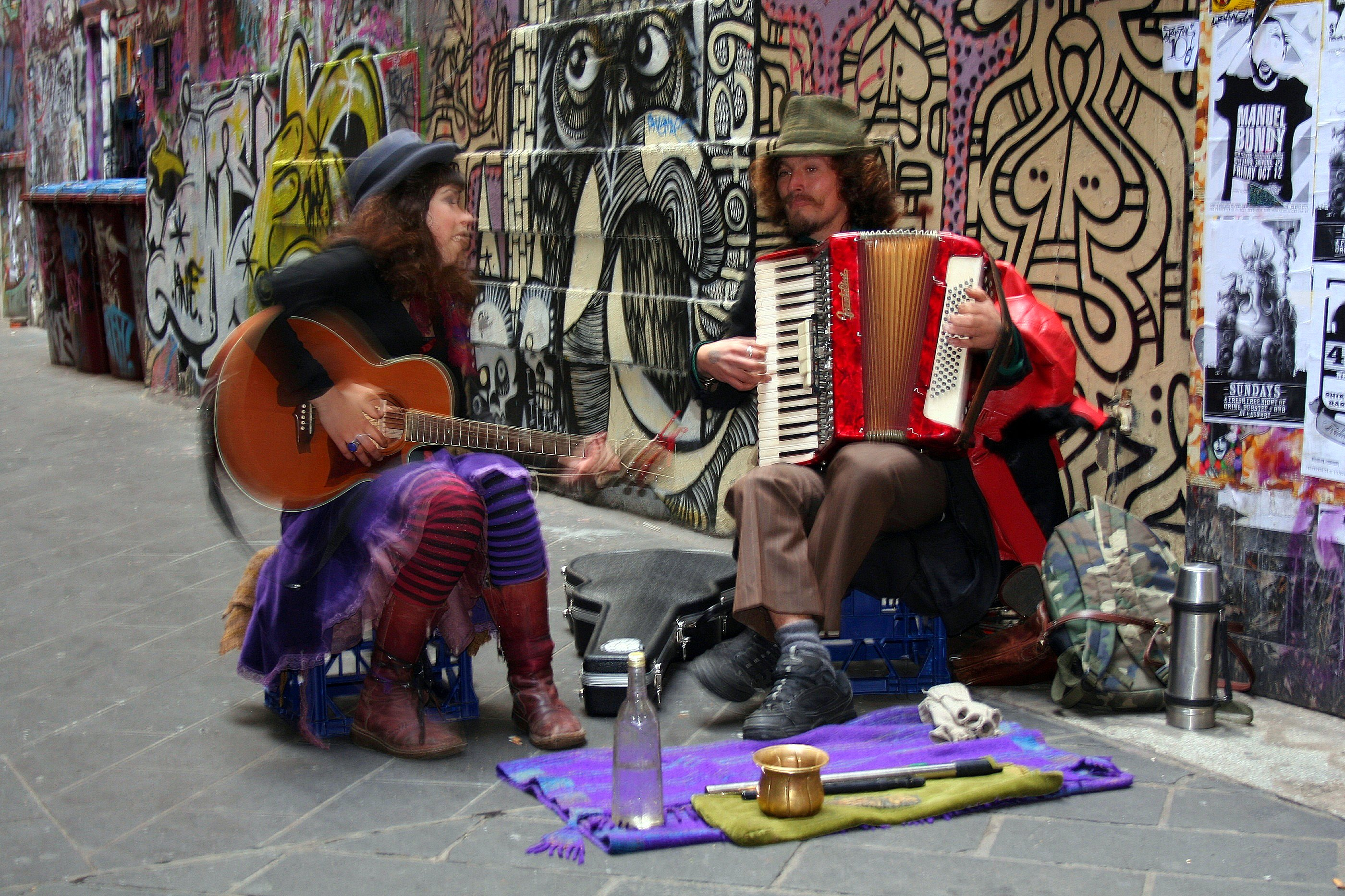 Buskers performing near Degraves Street, Melbourne